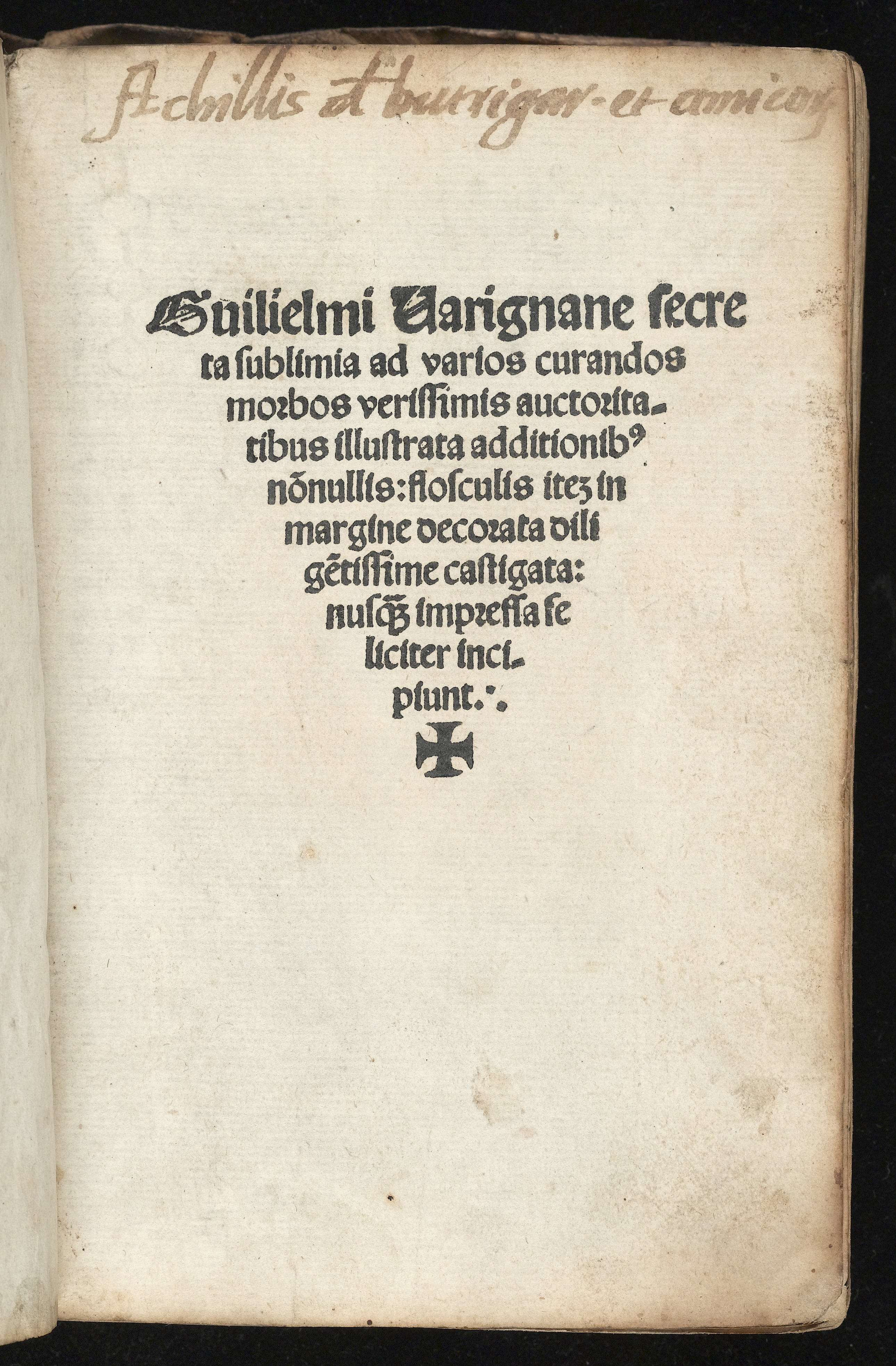 Secreta sublimia ad varios curandos morbos verissimis auctoritatibus illustrata additionibus nonnullis, flosculis item in marginedecorata, diligentissime castigata, nusquam impressa feliciter incipiunt/ Titlepage and inscription. Rare Books